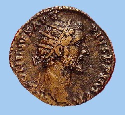 Dupondius d'Antonin le pieux Image récupérée depuis Wikipédia anglais : [1] recadrée et modifiée par Siren 6 nov 2004 à 11:06 (CET) Catégorie:Image de pièce de l'antiquité